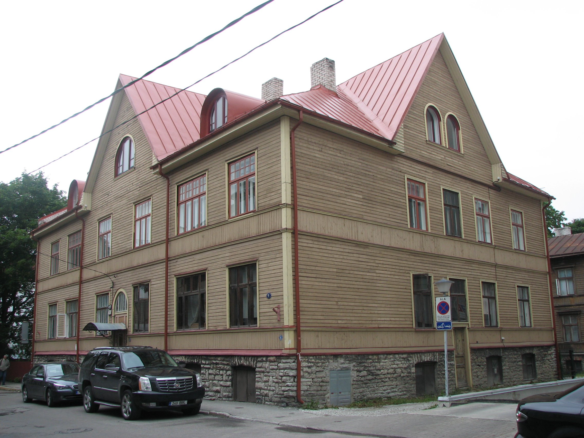 Elamu Peeter Süda tänav 9, Tallinn, 20. sajand